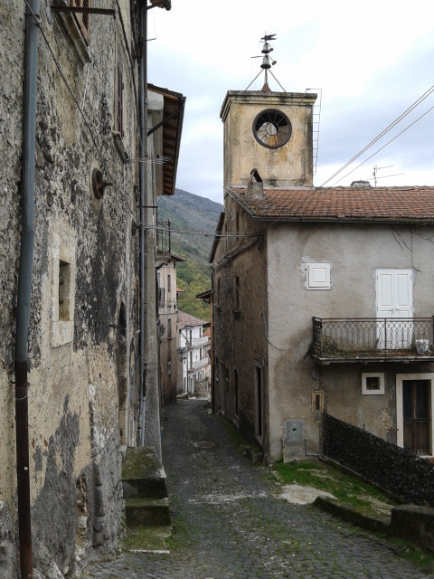 Torretta-orologio dell'ex casa comunale e vicolo del borgo antico